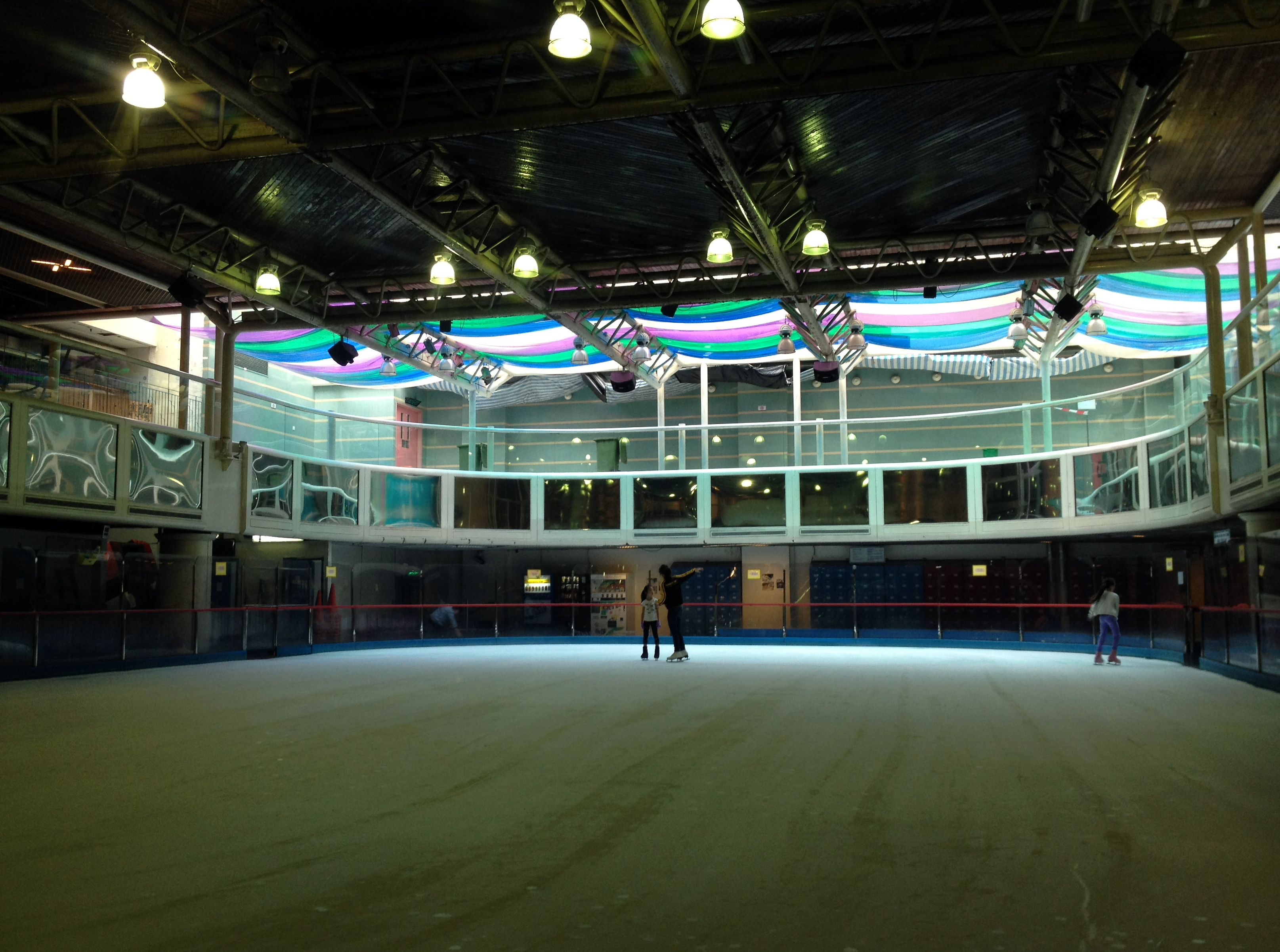 Riviera Plaza Ice Skating Rink 海濱廣場 (荃灣)